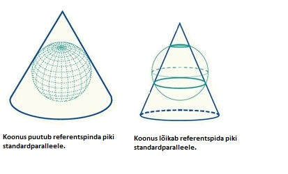 koonus4